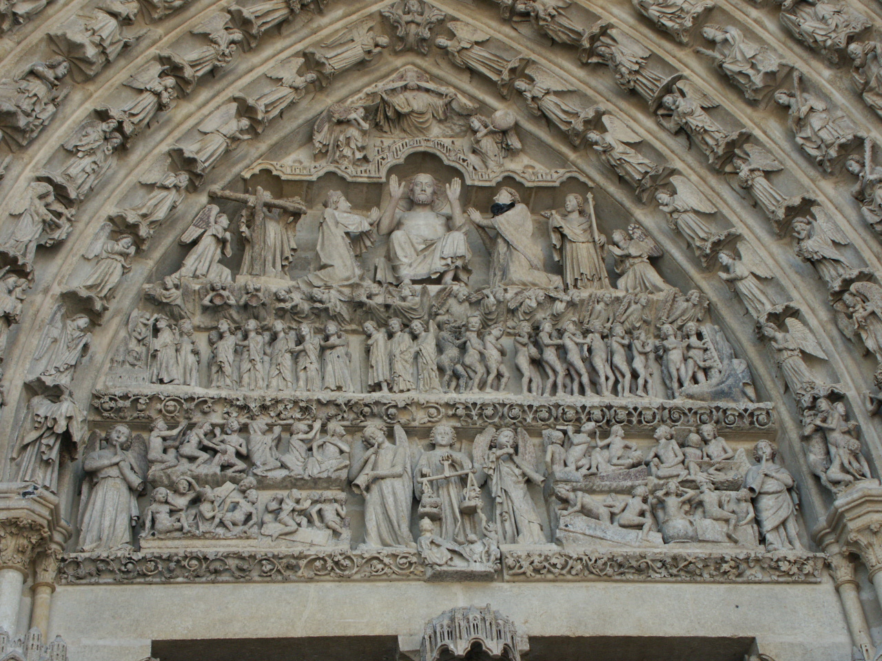 detalle del portico de la puerta principal de la catedral de Amiens que repressenta el juicio final